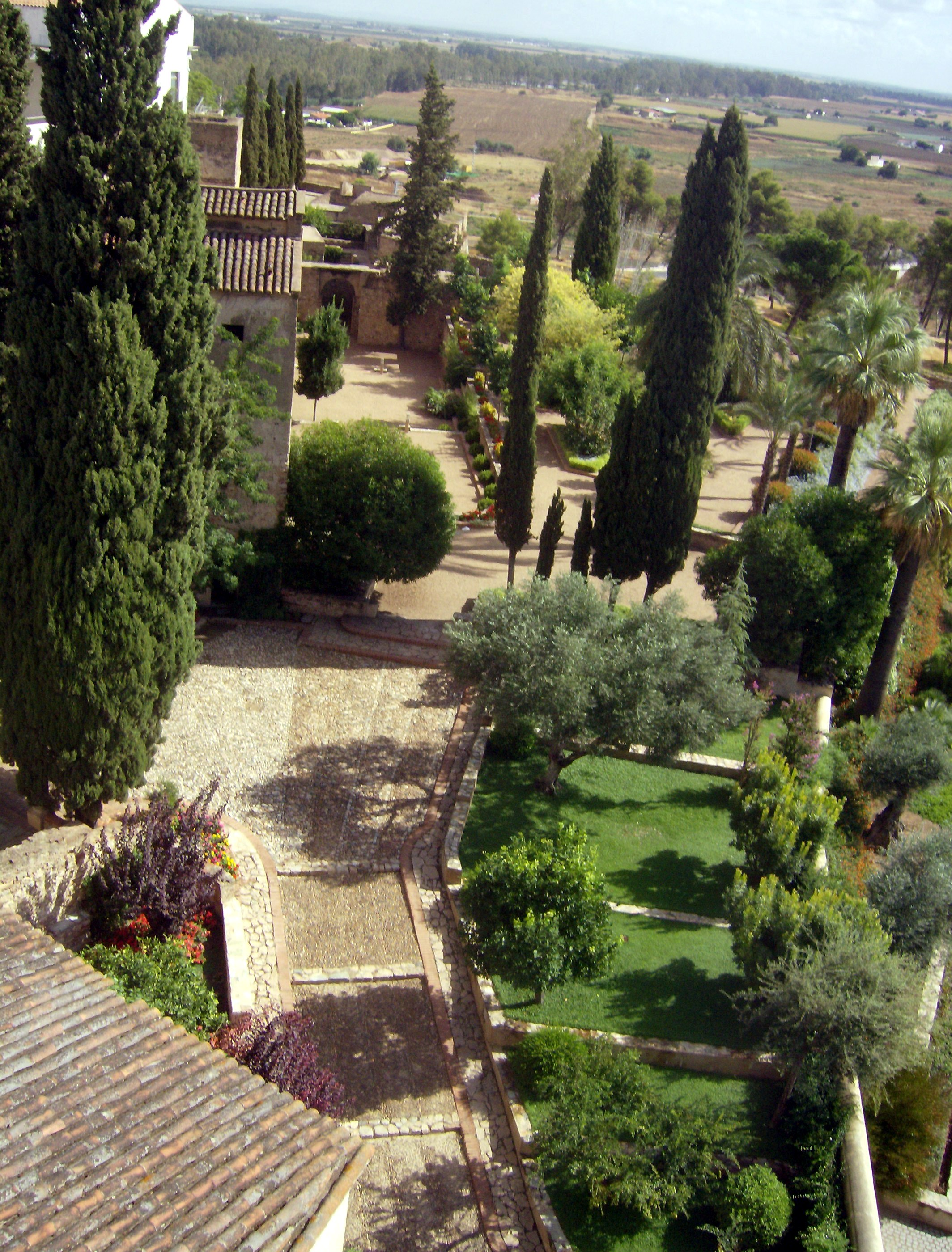 Imagen de los Jardines de La Galera de Badajoz desde la Torre de Espantaperros